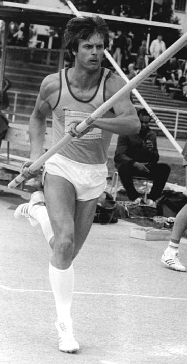 Torsten Voß ADN-ZB Bartocha 22.5.83 Neubrandenburg: DDR-Meisterschaften im Leichtathletik-Mehrkampf - Eine erfolgreiche Titelverteidigung gelang bei den Zehnkämpfern Torsten Voß (hier beim Anlauf zum Stabhochsprung) vom SC Traktor Schwerin. Mit 8337 Punkten blieb er nur um 50 Zähler unter seiner Bestleitung.